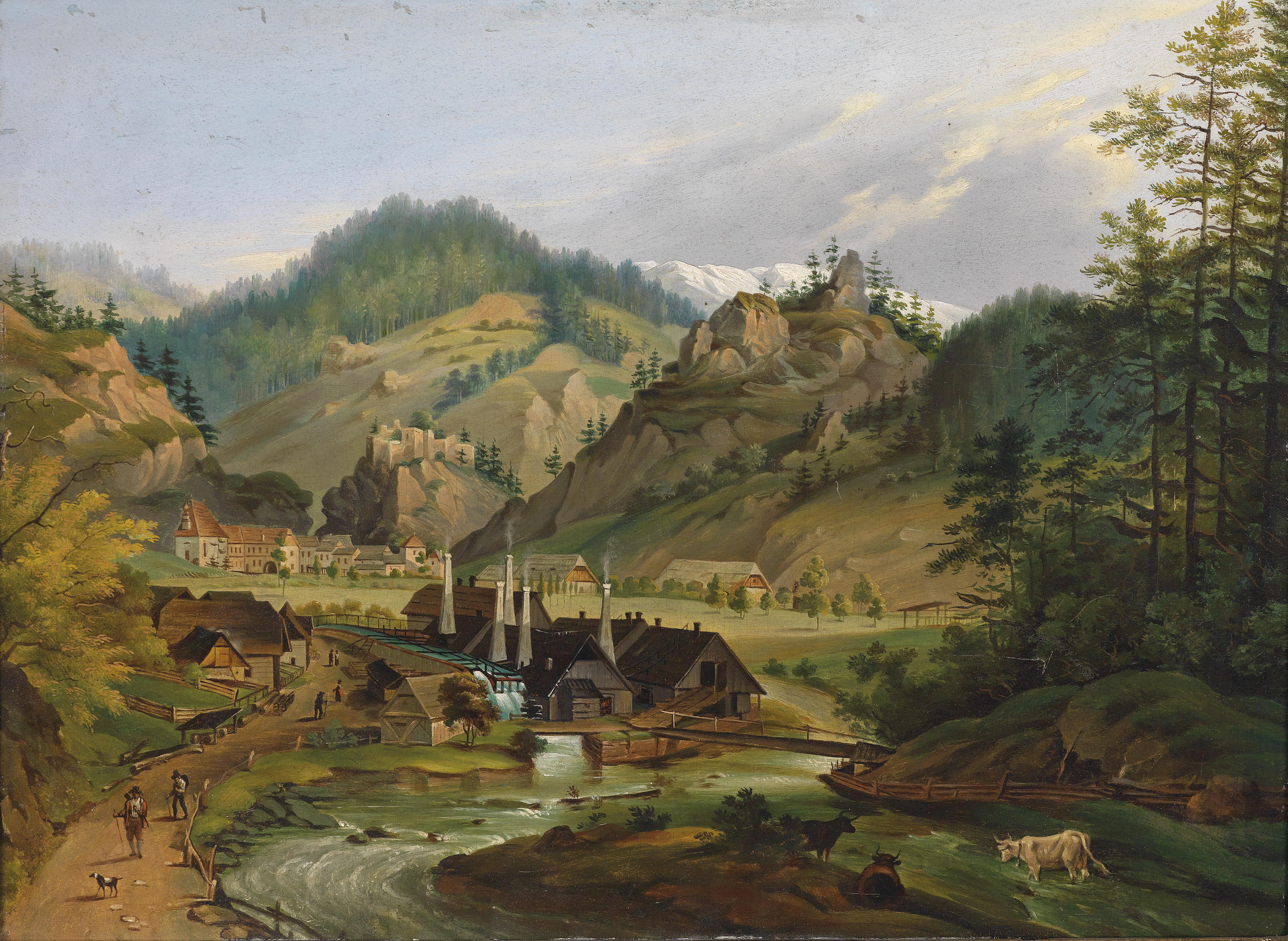 Blick auf Thörl, Steiermark, Öl auf Holz, 28 x 38 cm